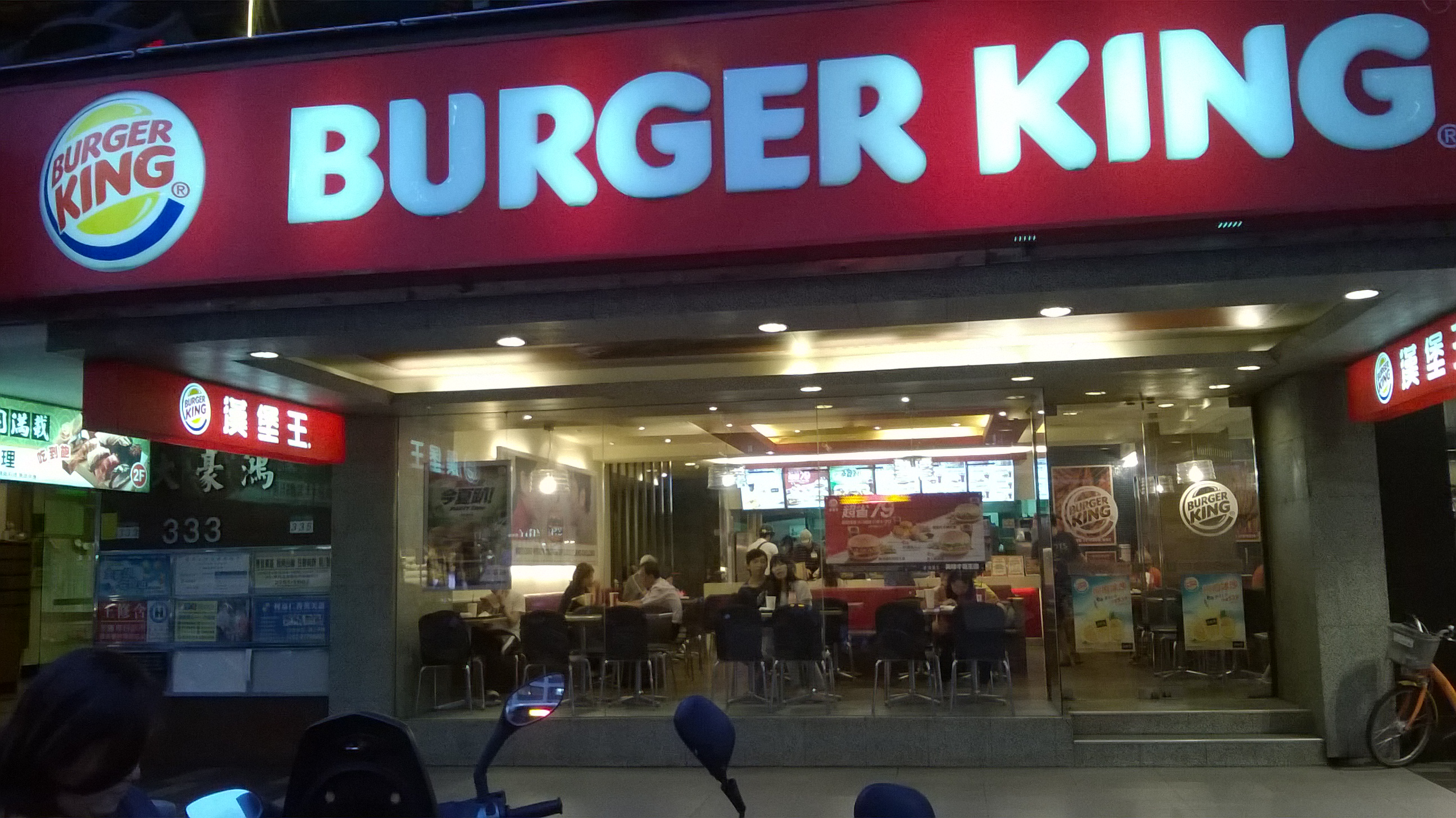 漢堡王忠孝店，地址：臺北市大安區忠孝東路四段335號1樓（鴻豪大樓）。